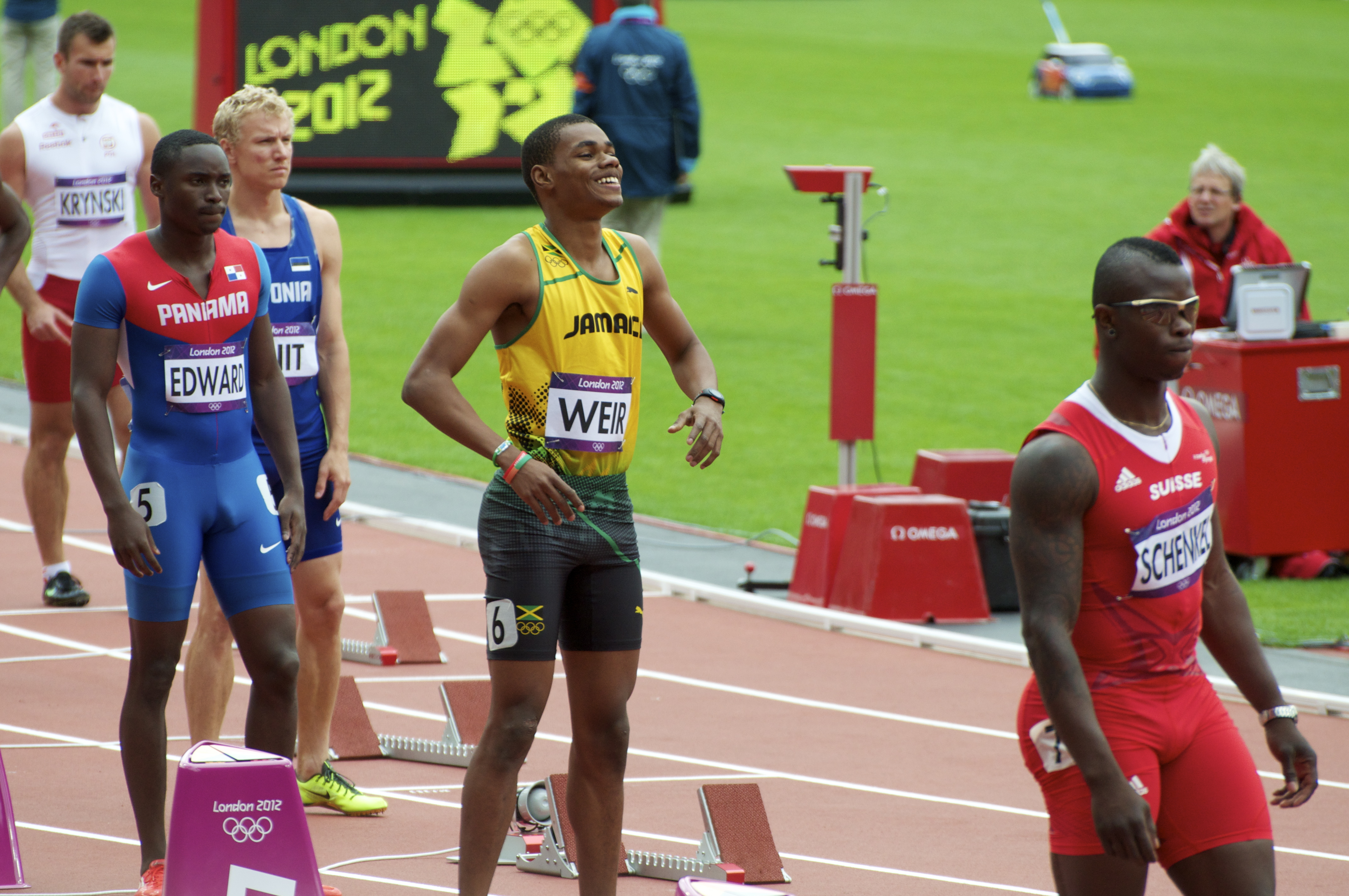 Warren Weir